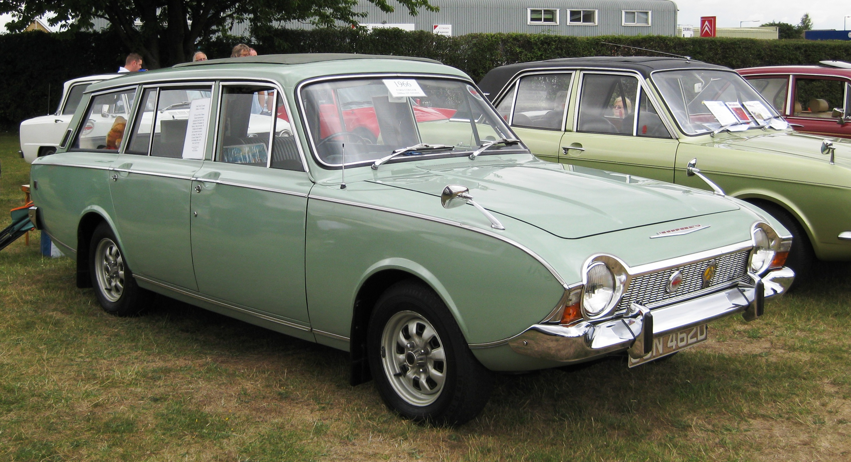 Ford Corsair Estate